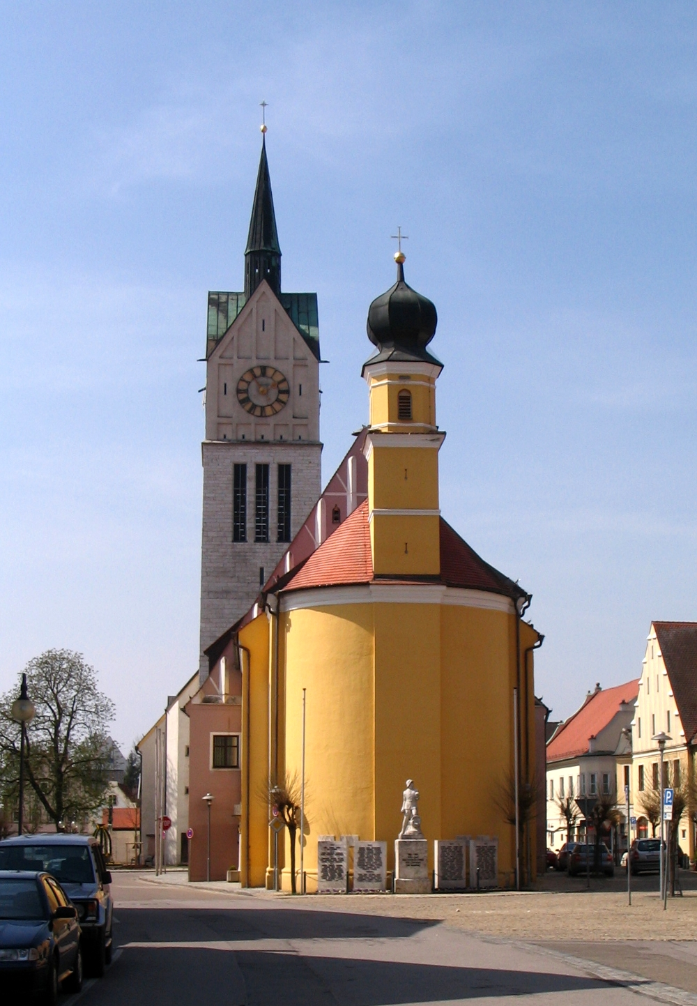 Stadtpfarrkirche St.Laurentius Neustadt an der Donau mit St.Anna-Kapelle